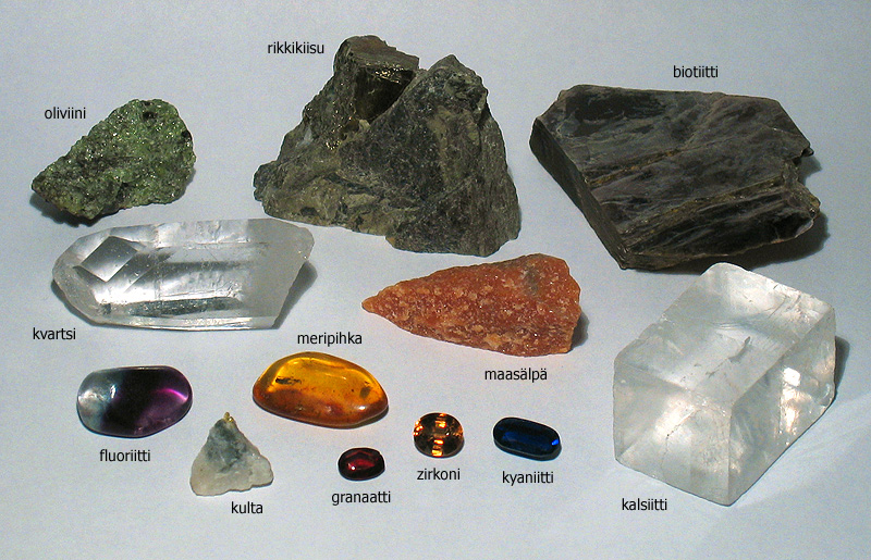 Erilaisia mineraaleja.